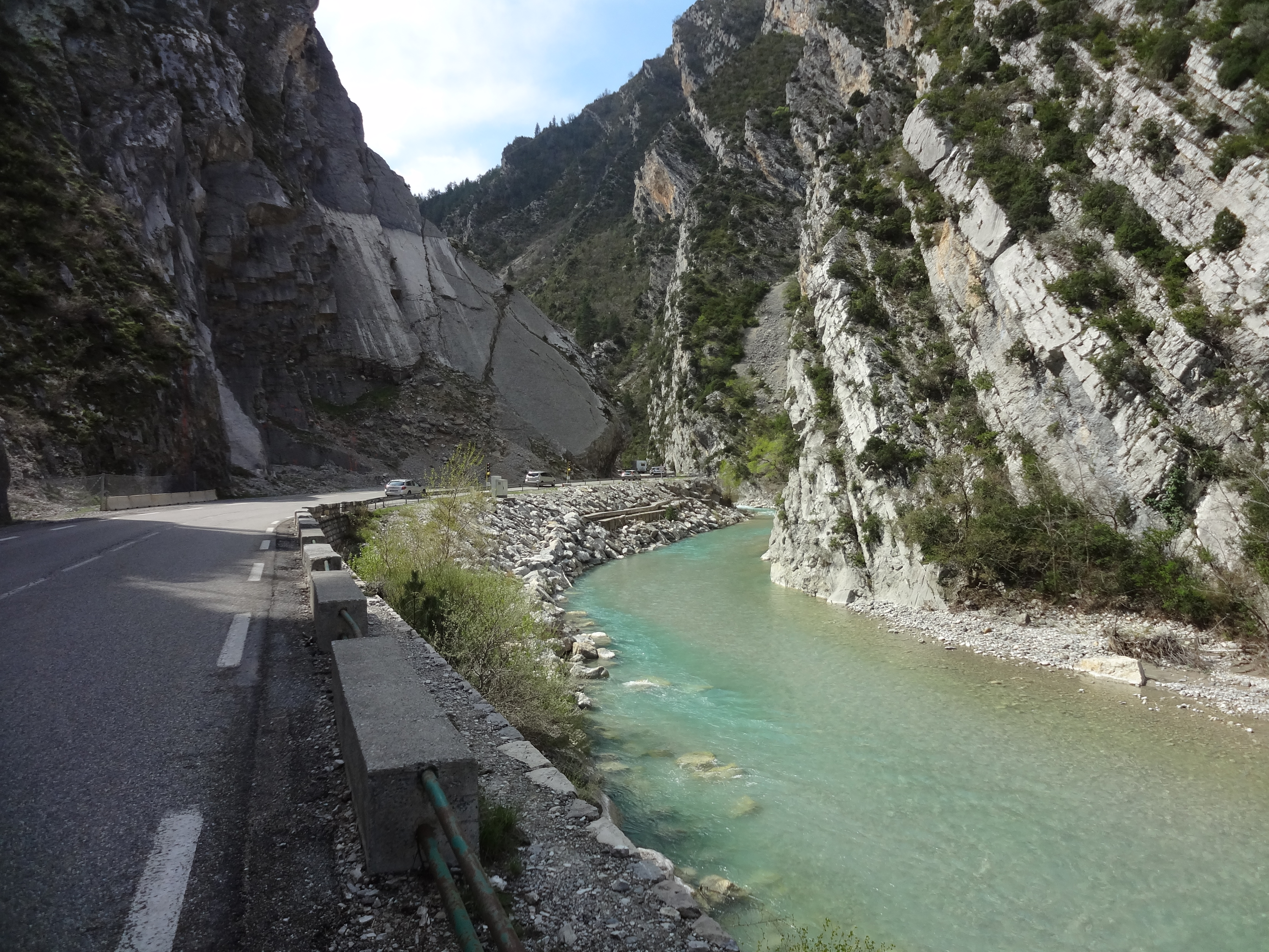 clue de Chabrières : vue de la RN 85 et de la rivière Asse (Alpes-de-Haute-Provence)